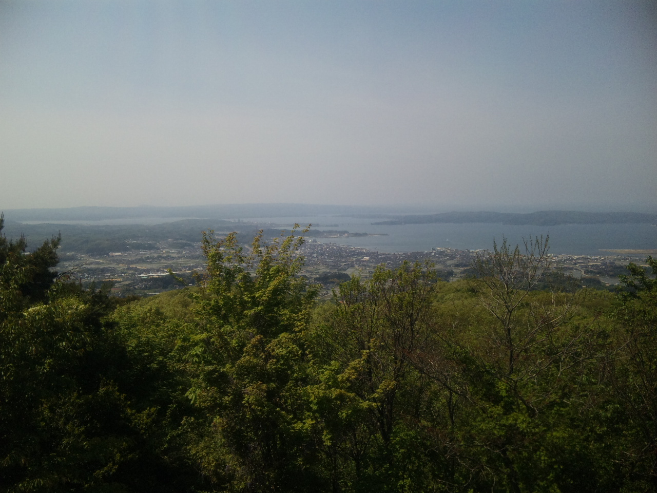 七尾市風景（城山展望台）